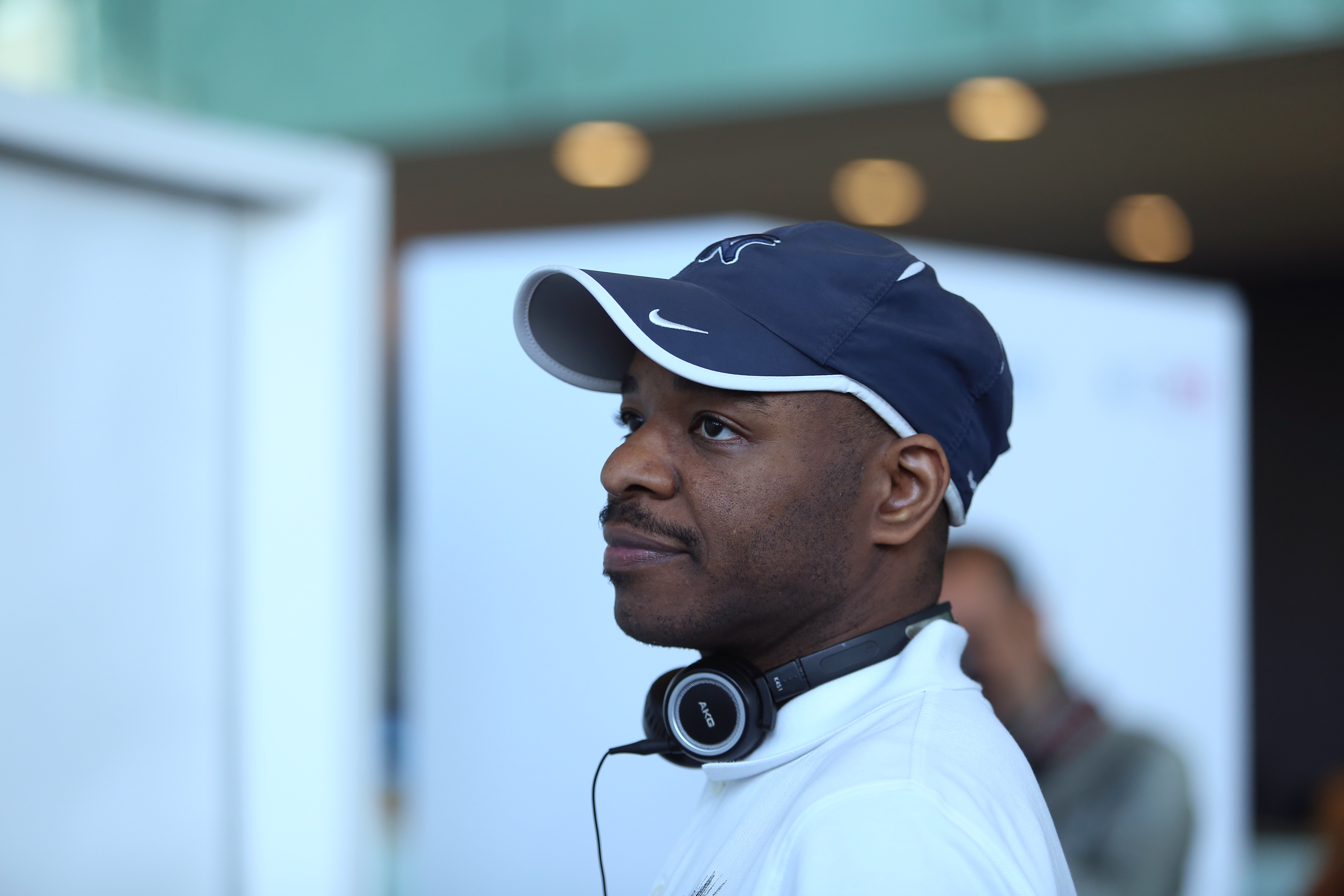 Stephen Wiltshire dibujando un paisaje de la Ciudad de México